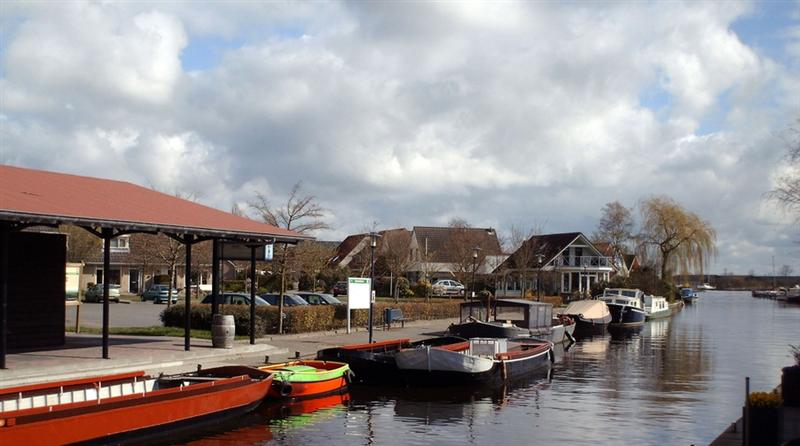 Terhorne Kameleondorp